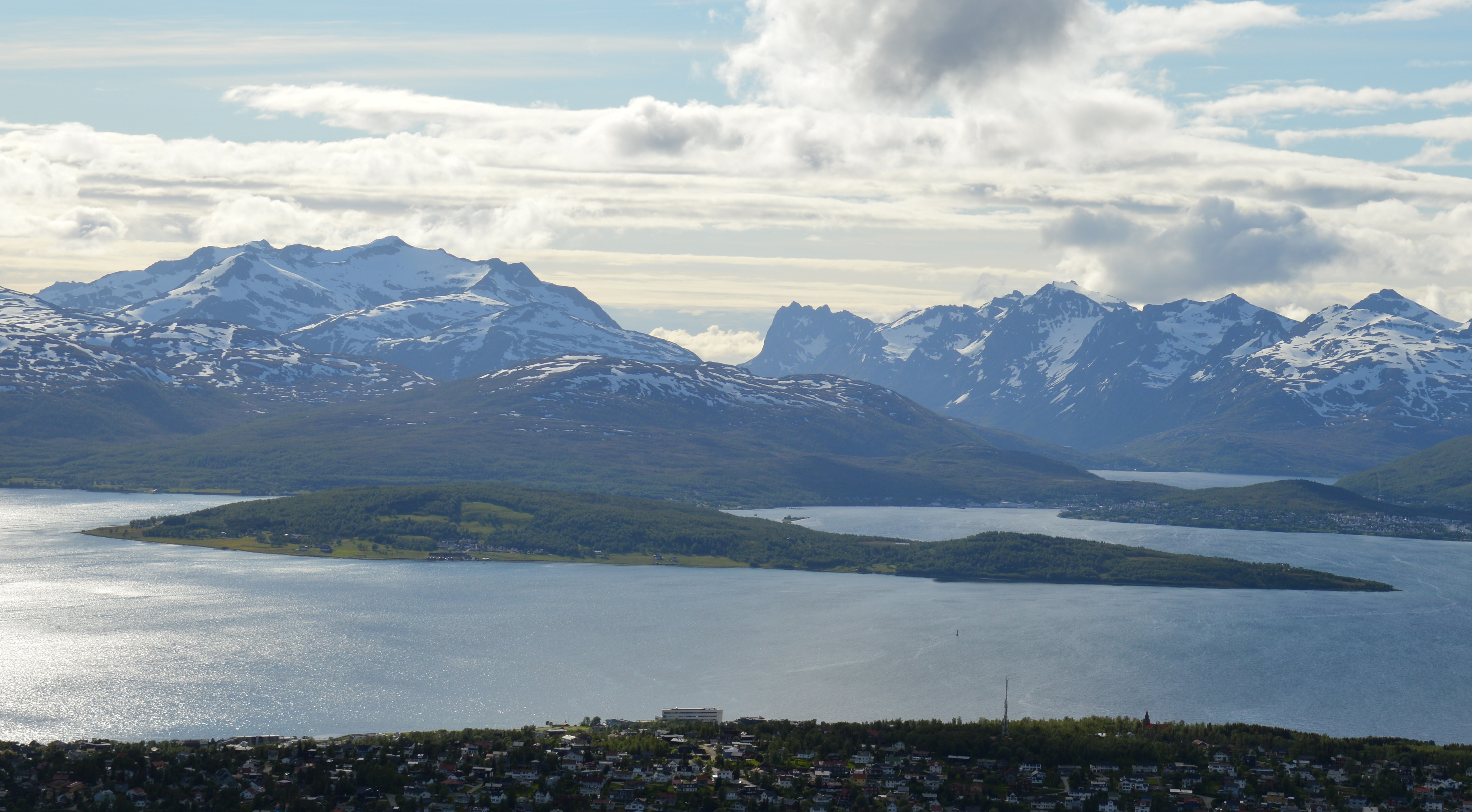 Håkøya bei Tromsø